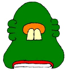 Glifo de Tepetitlán, Hidalgo